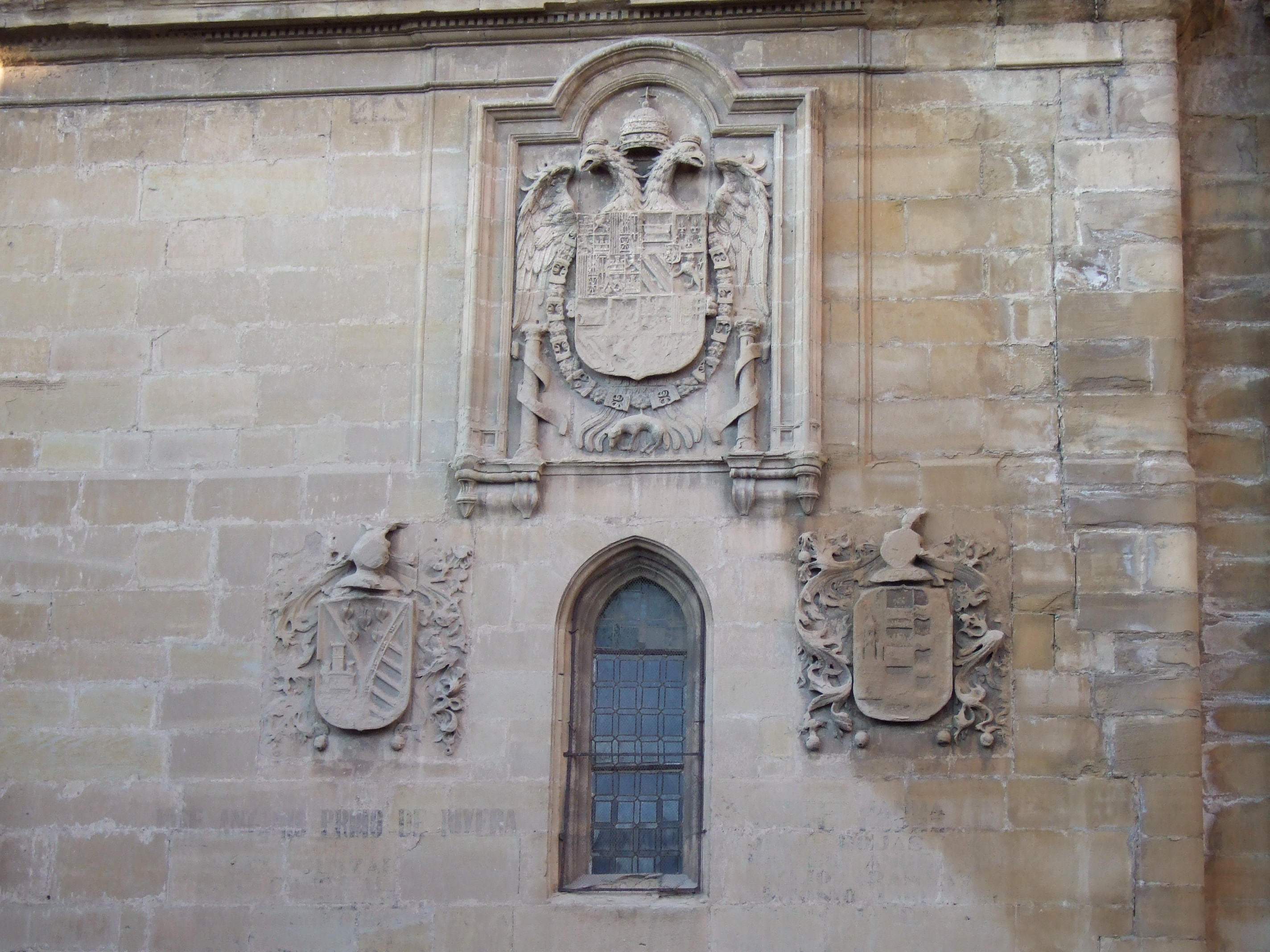 Santo Domingo de la Calzada - Catedral - Fachada